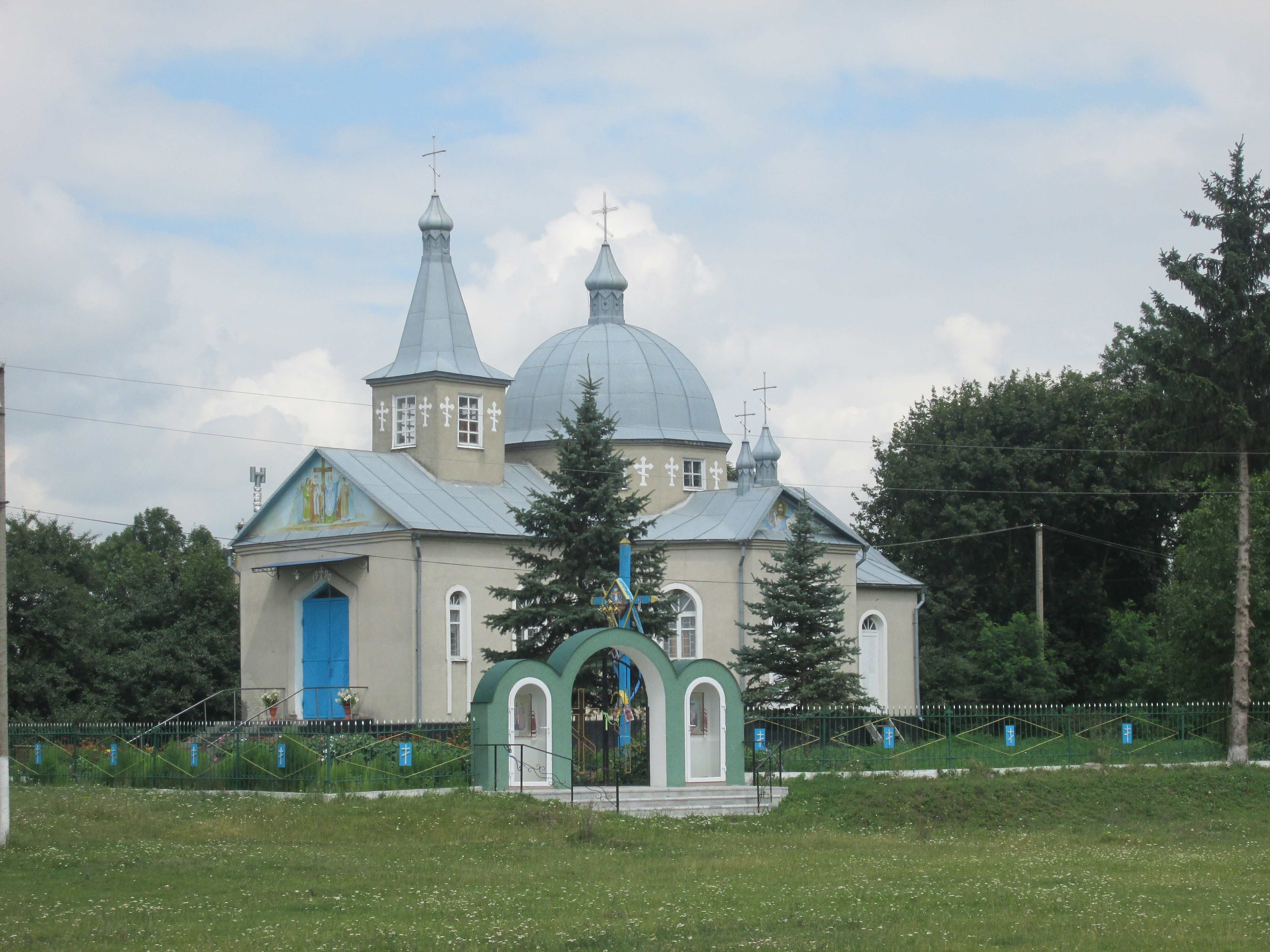 Свято-Воздвиженська церква у селі Воронівці (Теофіпольський район).